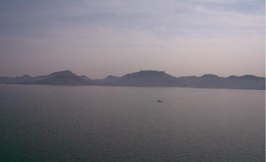 కోయిల్‌సాగర్